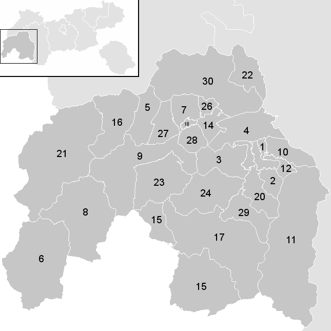 Leere Karte mit den Gemeinden im Österreichischen Bezirk Landeck